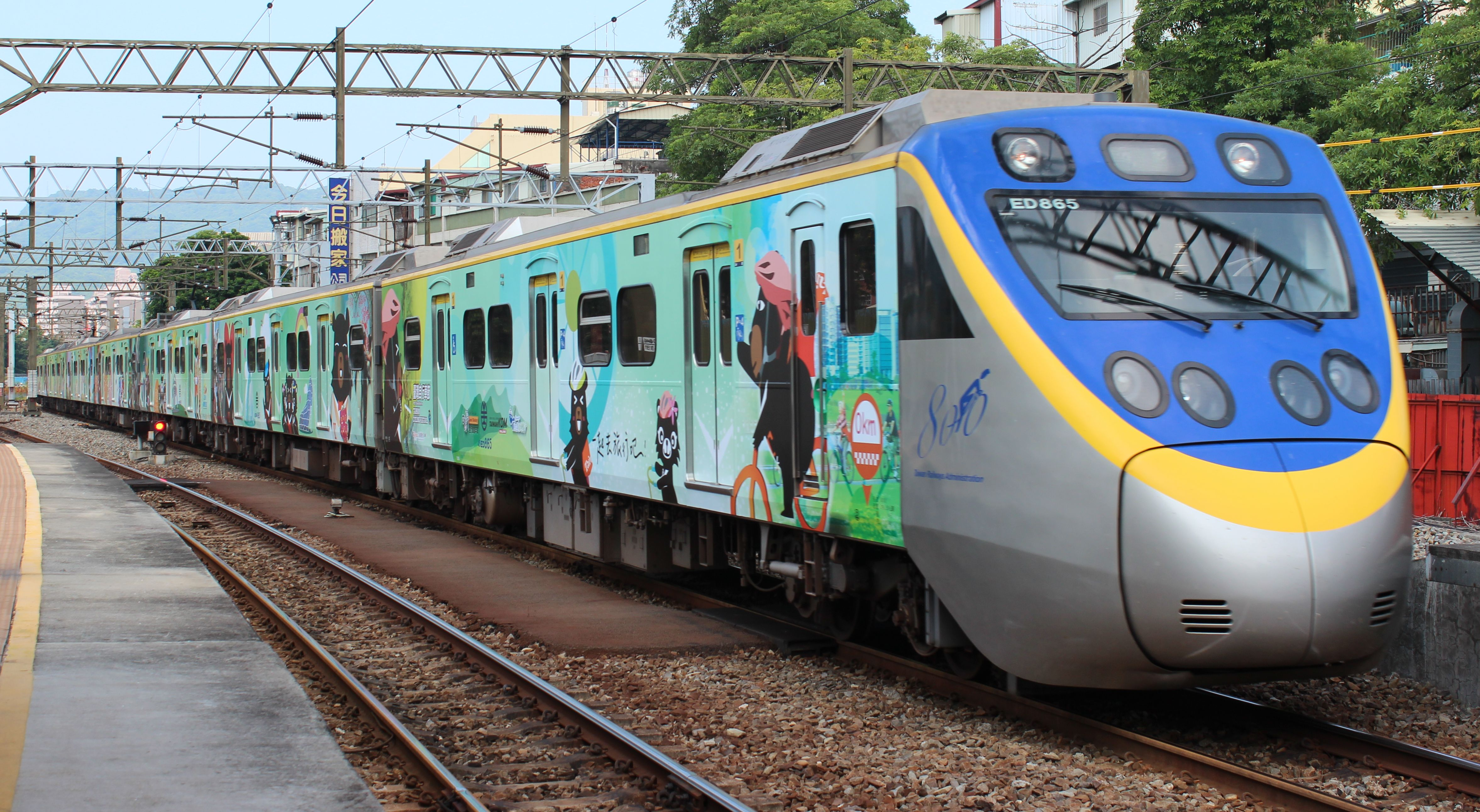 台湾鉄路管理局EMU800型電車 交通部観光局「2016台湾自行車節」ラッピング編成 高雄駅で撮影